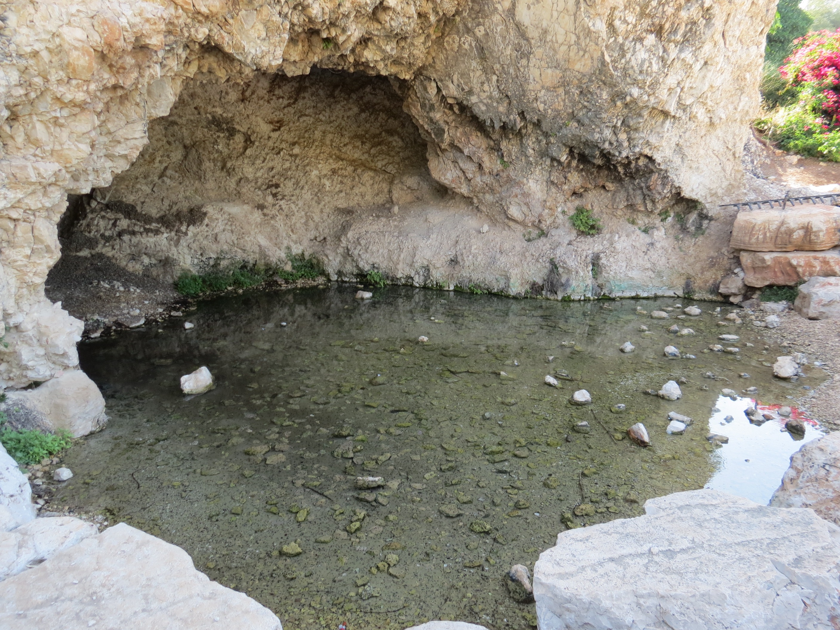 Ma'ayan Harod National Park, Harod Valley, Israel מעיין חרוד